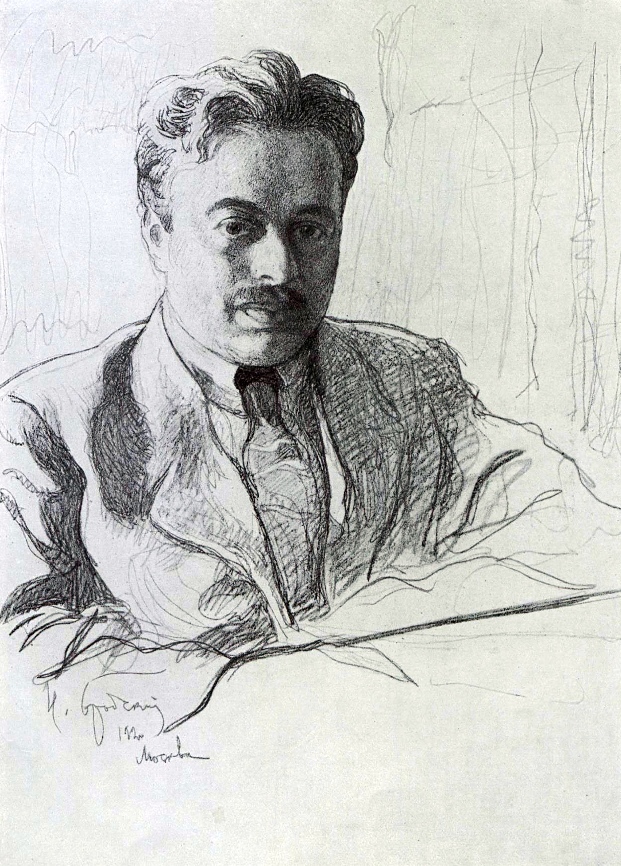 Кун, Бела